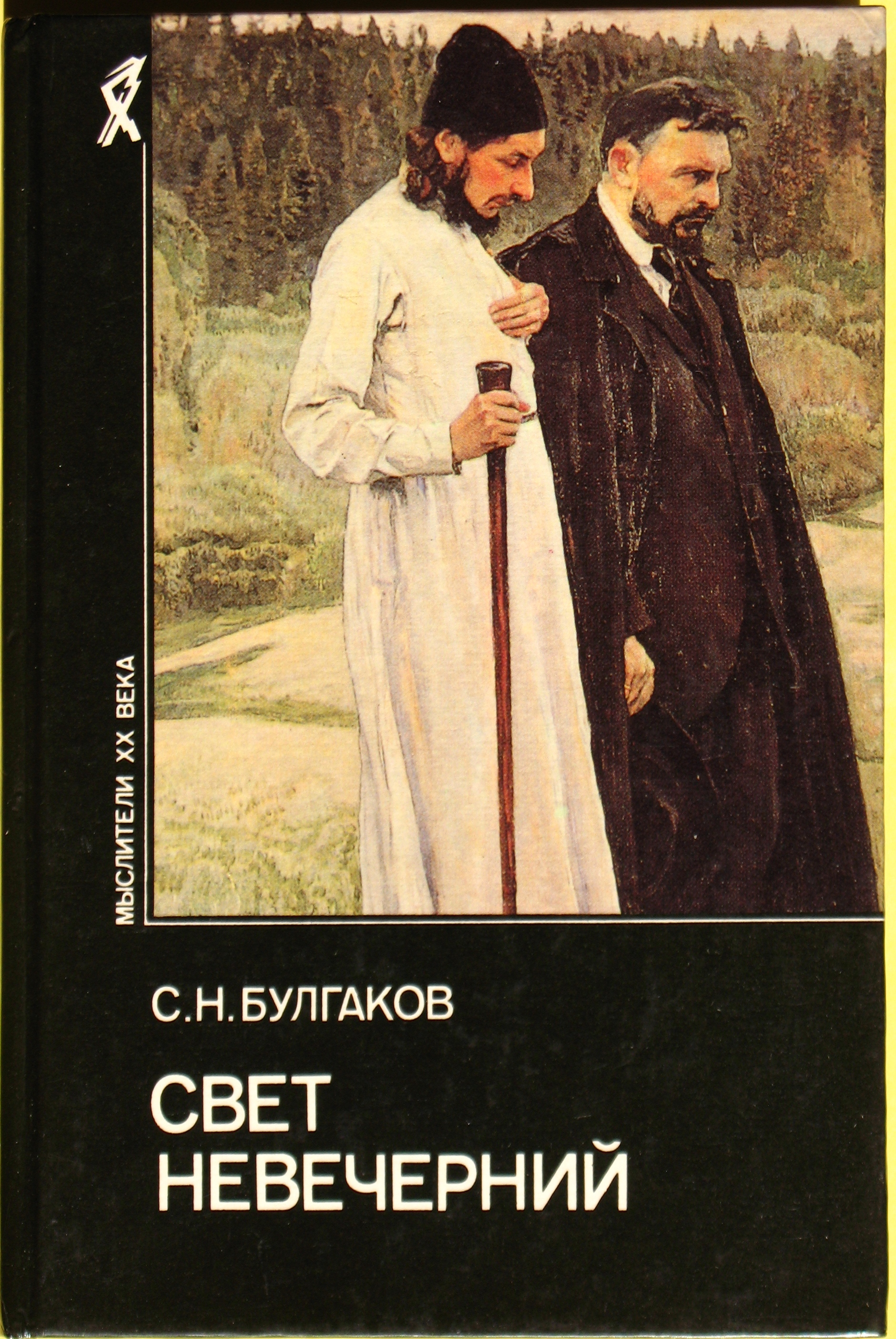 Sergei Bulgakov book. Серия "Мыслители XX века". Булгаков Сергий, Свет невечерний. Москва, изд. "Республика", 1994, тираж 40 000, 416 стр. Обложка - картина М. В. Нестерова "Философы", где Сергей Булгаков справа. Depiction of philosophers Pavel Florensky and Sergei Bulgakov